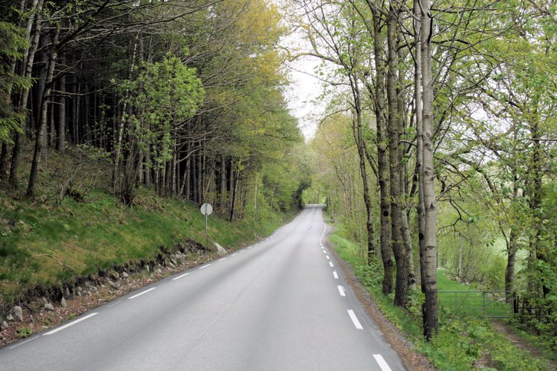 Fylkesvei 220, Klepp kommune Rogaland